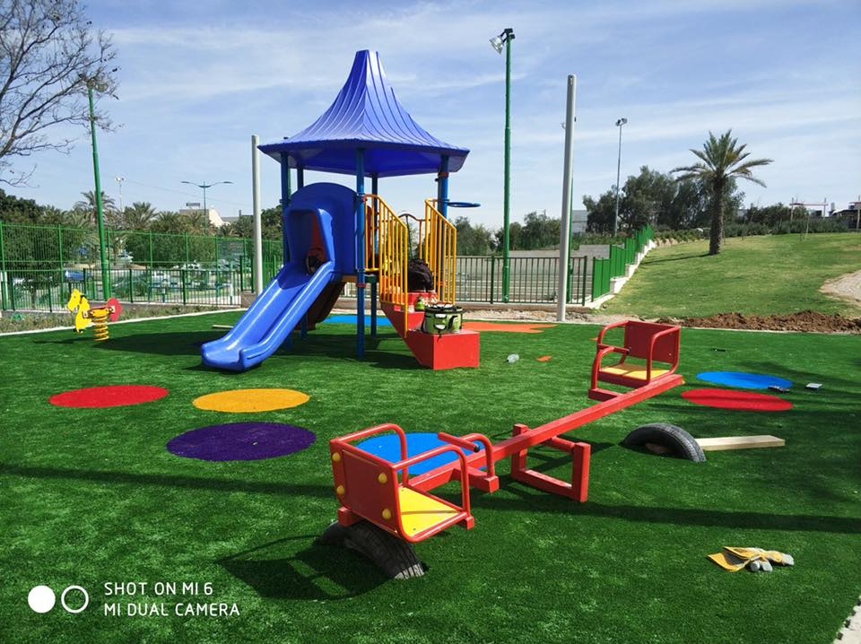 מתקני משחקים בפארק המשחקים בעיר רהט